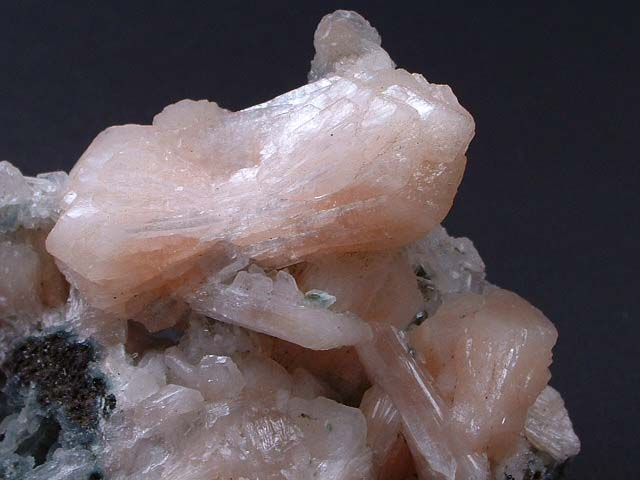 minerał; stylbit, pochodzenie- Indie, autor zdjęcia Stowarzyszenie Spirifer 10.07.2006r.